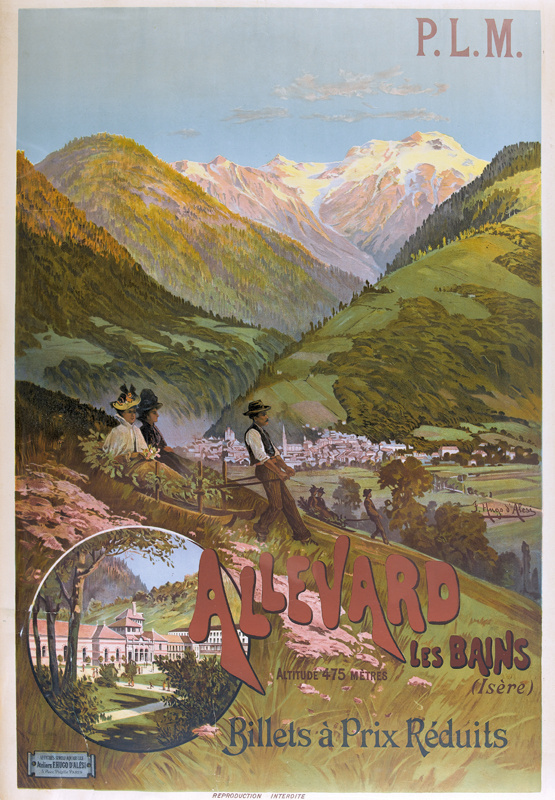 "Allevard les Bains". Farblithografie, 105,5 x 74,5 cm